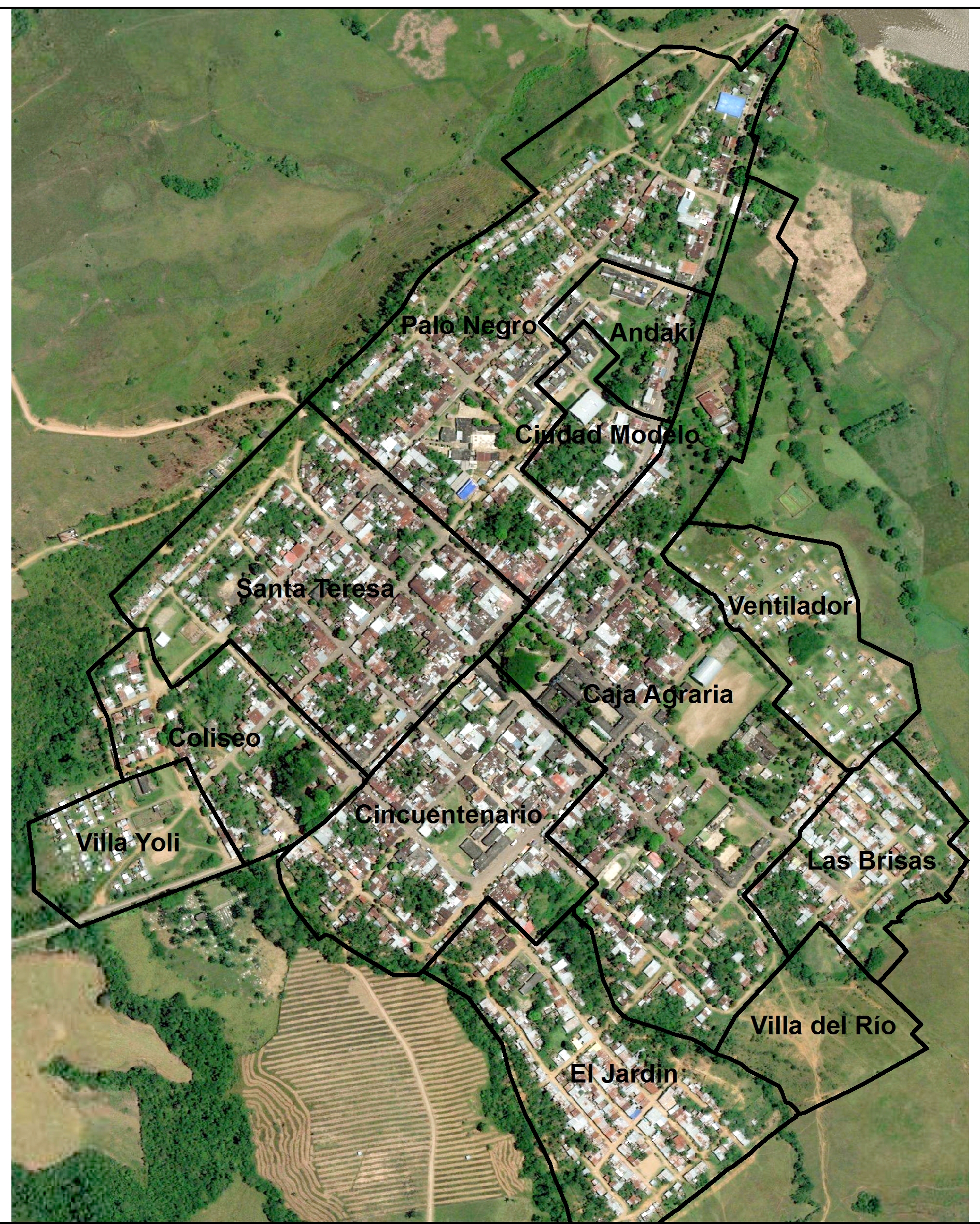 Barrios Belén de los andaquíes